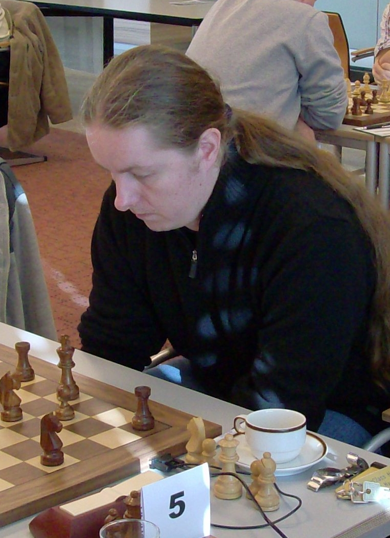 Liviu-Dieter Nisipeanu, Romanian chess grandmaster